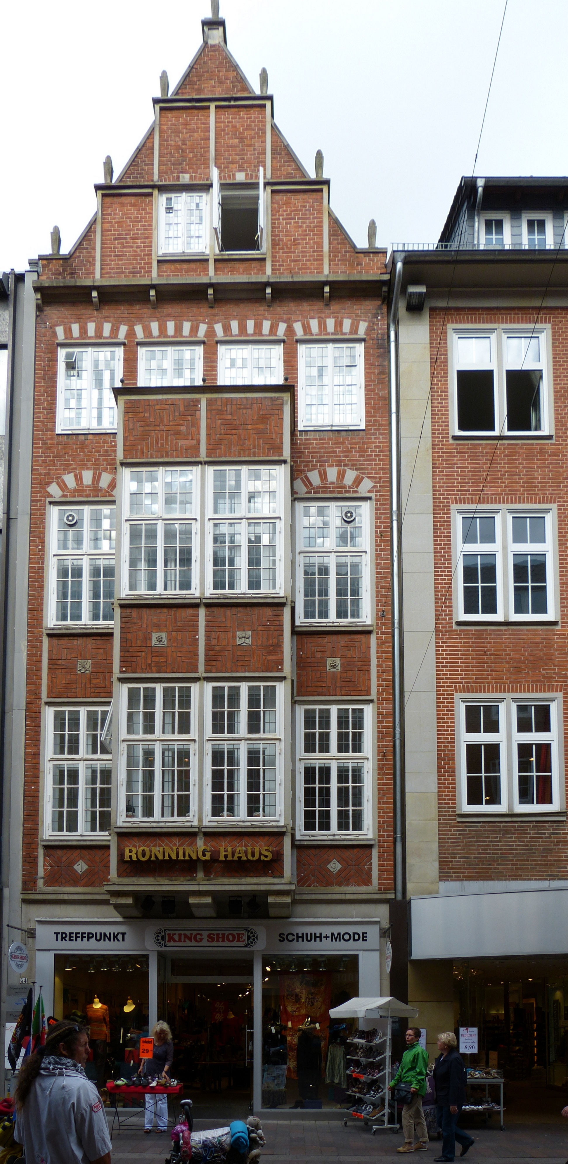 Ronning-Haus in Bremen, Sögestraße 54Das abgebildete Objekt ist ein geschütztes Kulturdenkmal in der Freien Hansestadt Bremen, mit der Nr. 1148 beim Landesamt für Denkmalpflege registriert.